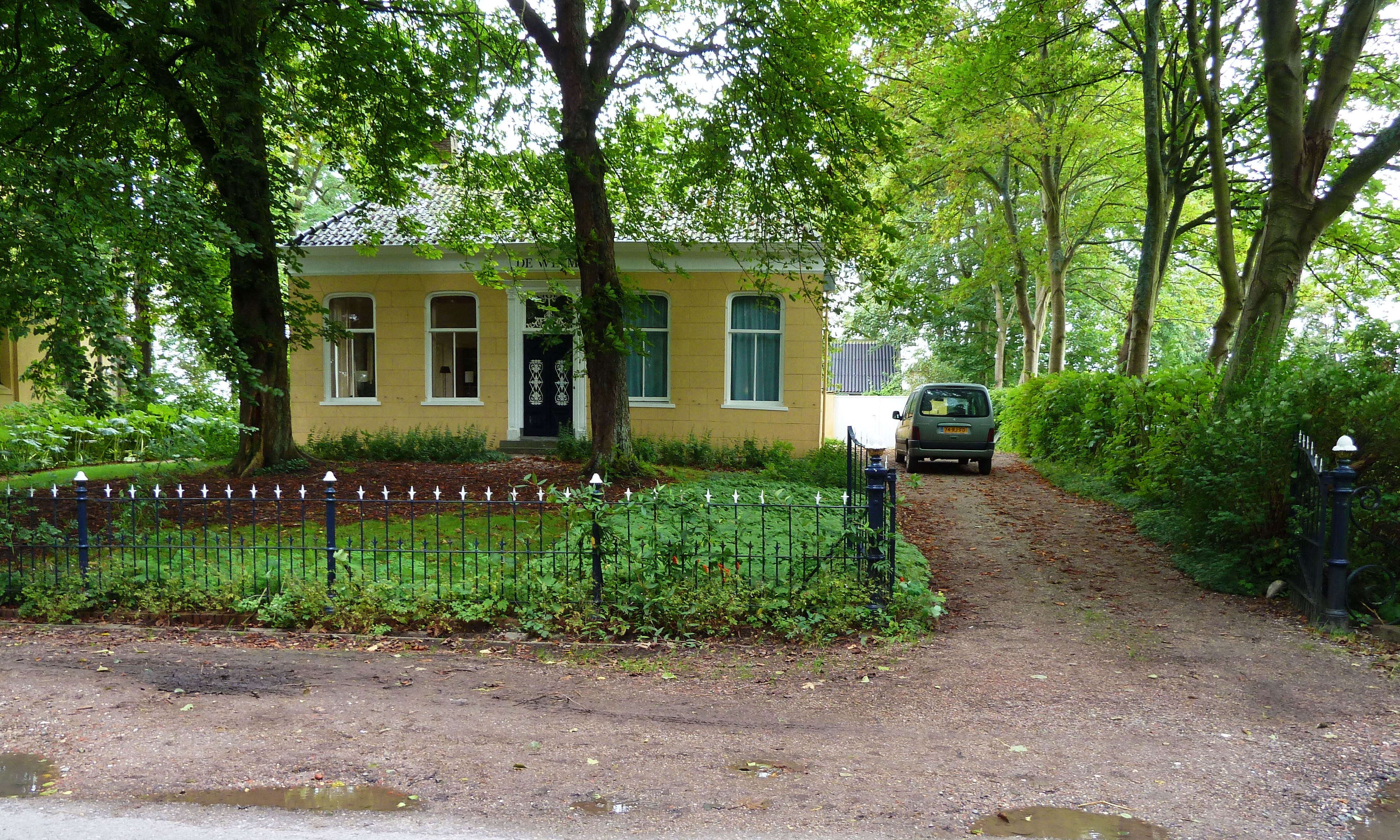 Pastorie van Westernieland.